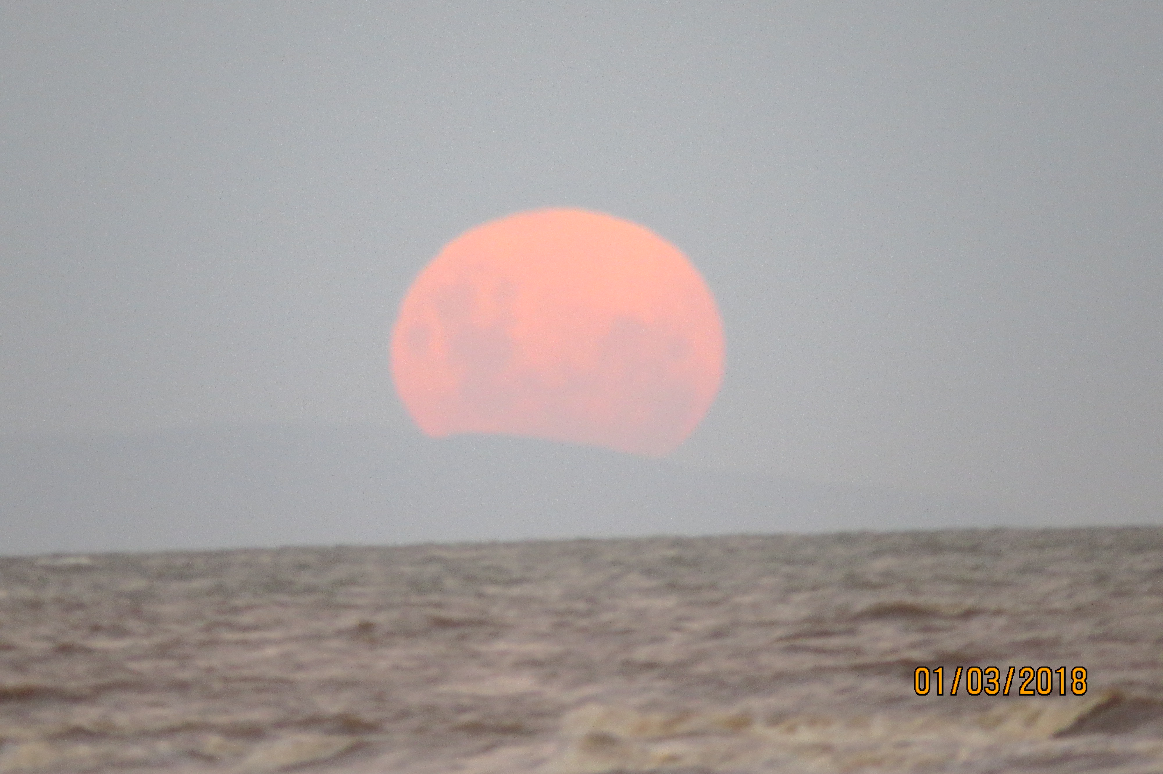 Saliendo del mar